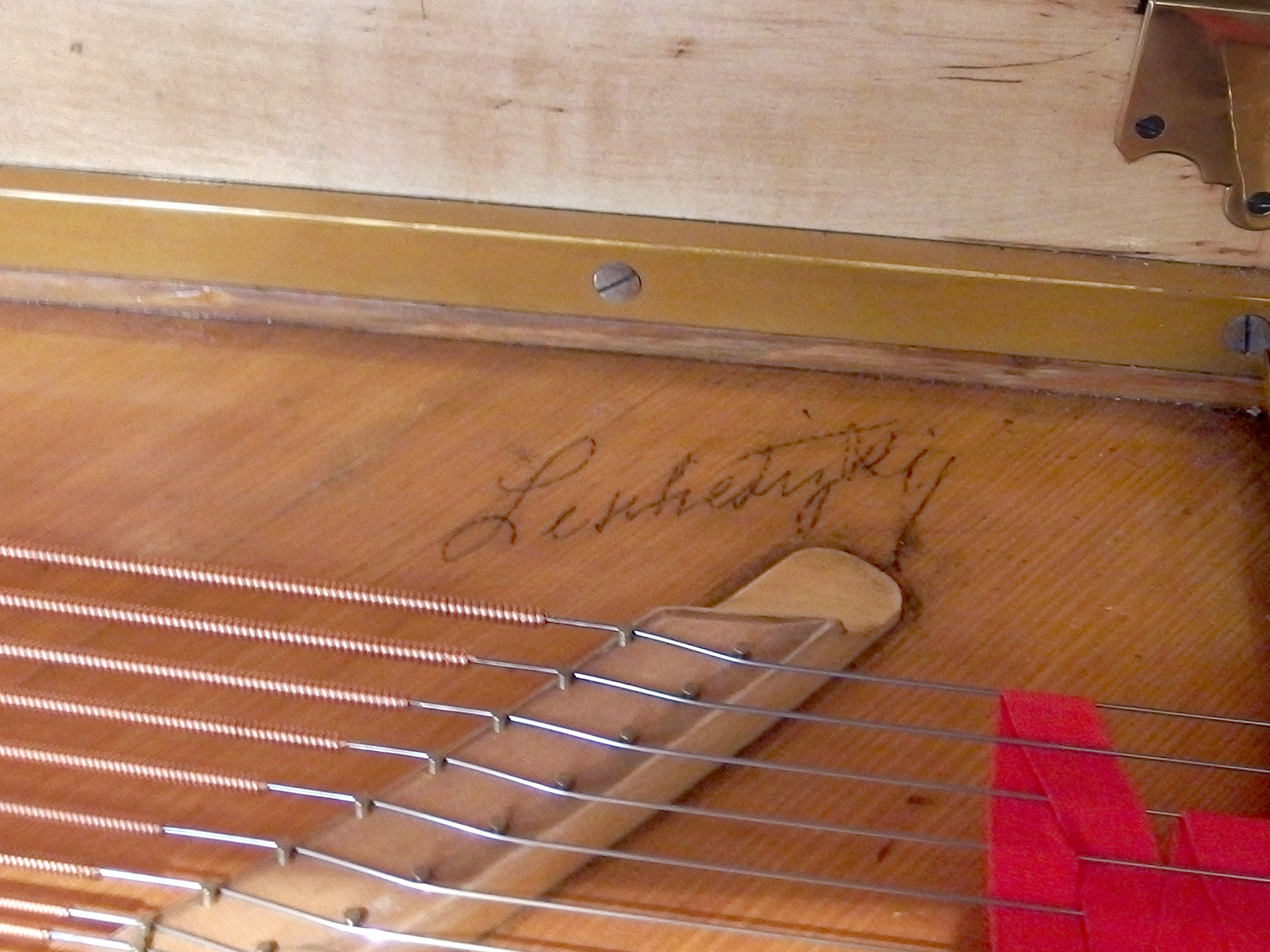 Handschrift von Theodor Leschetizky auf dem Resonanzboden